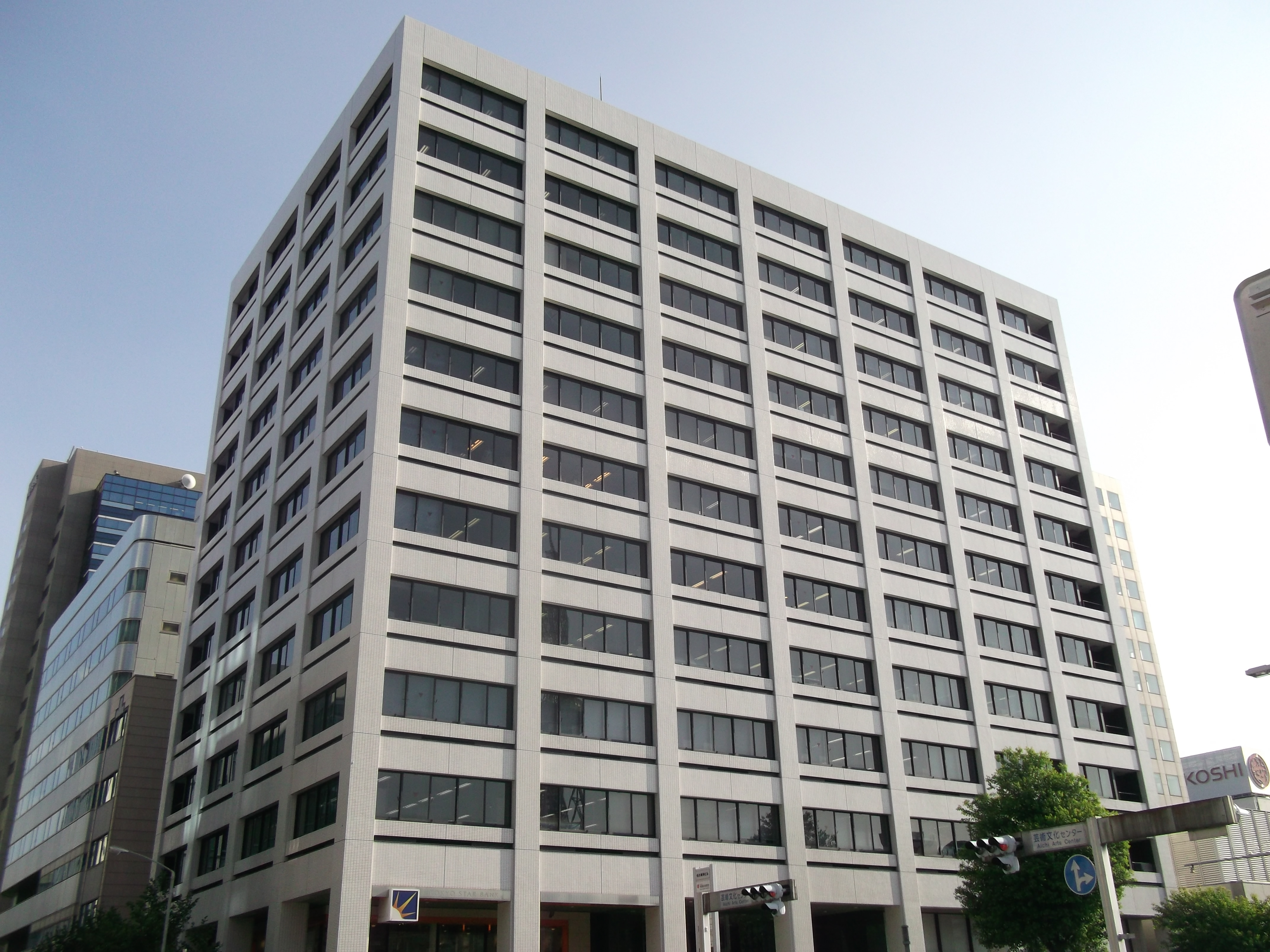 名古屋市東区の名古屋栄ビルディングを北側公道東側より撮影。東区武平町（5丁目）の全景でもある。